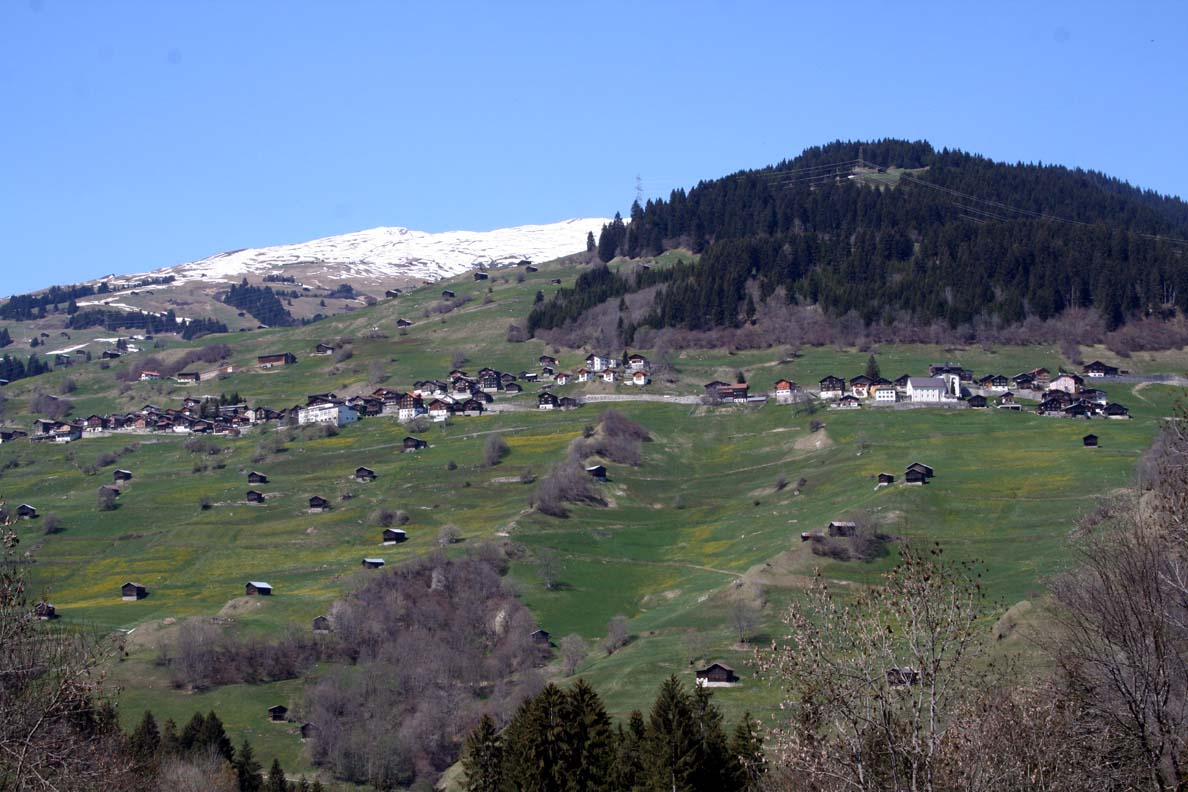 Andiast